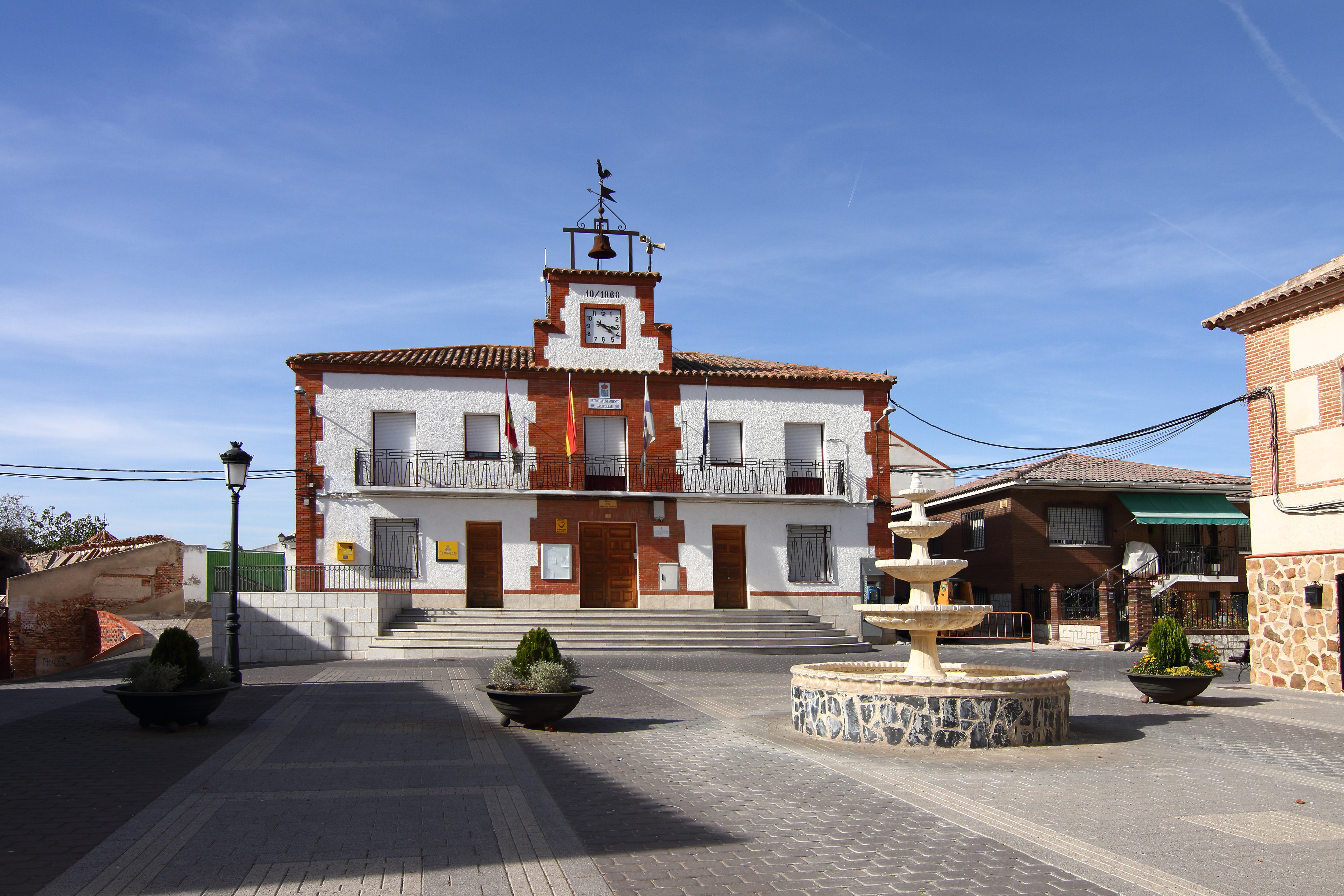 Ayuntamiento de Arcicóllar